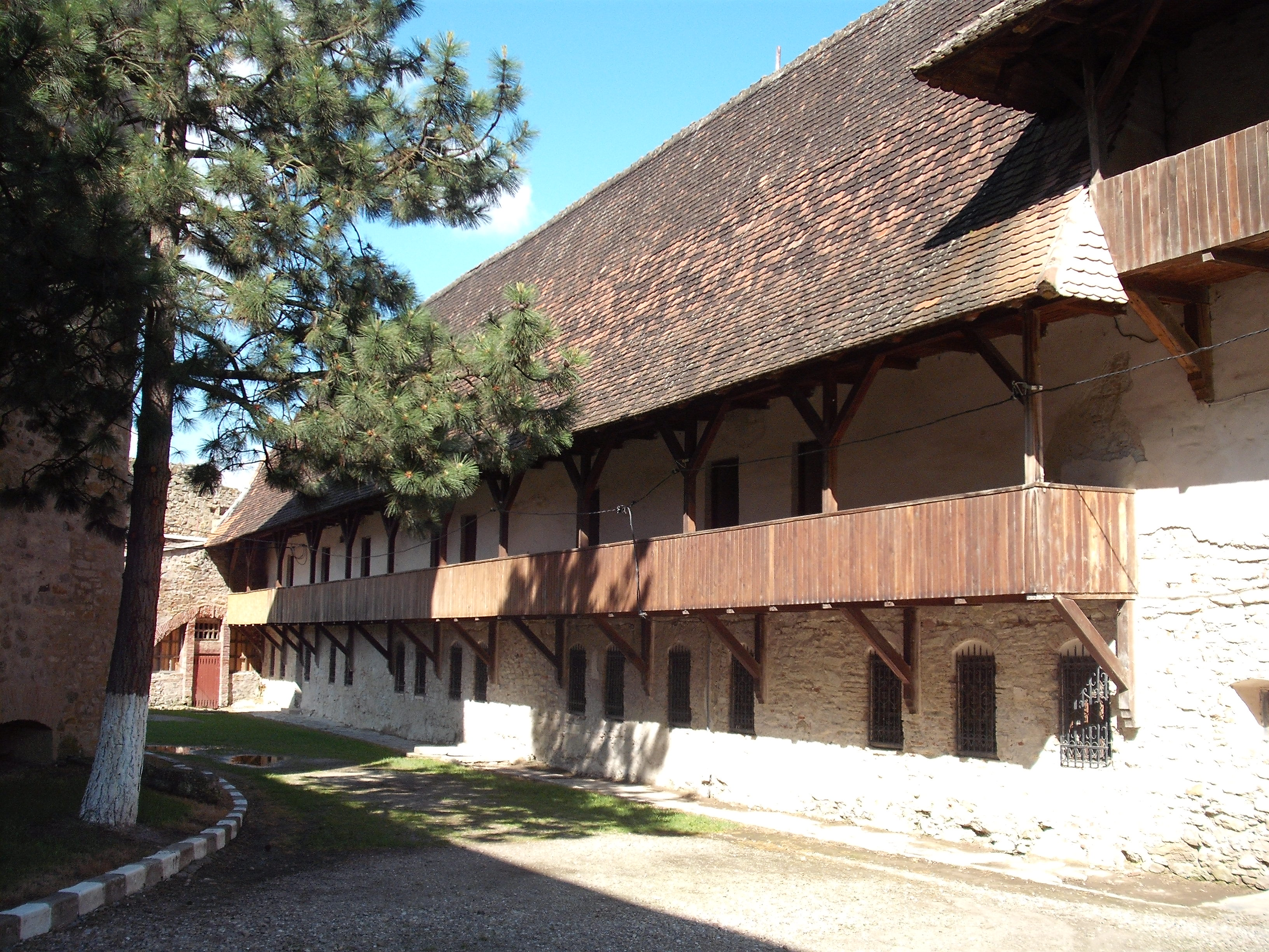 Incinta bastionară (incinta exterioară), cu turnul de poartă și clădirile anexe 02